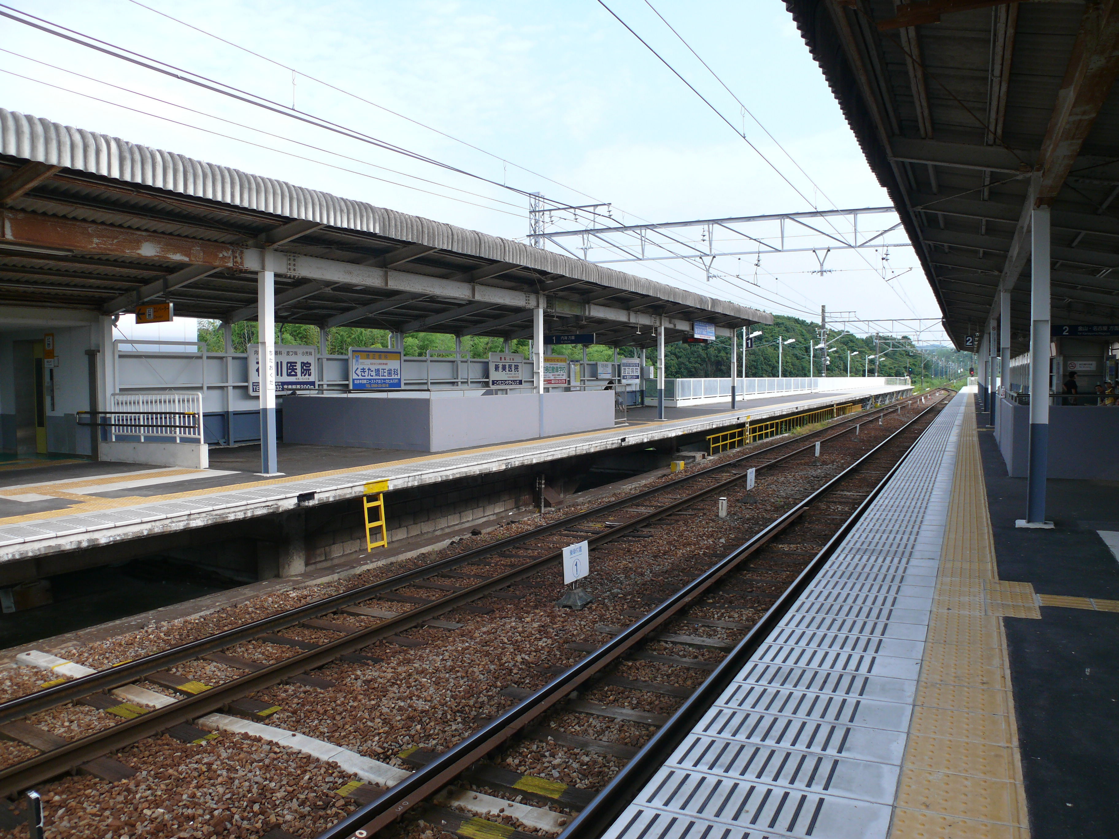 愛知県知多郡美浜町にある名古屋鉄道の知多奥田駅